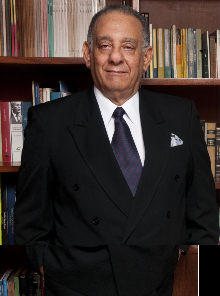 Luis Henry Molina Peña